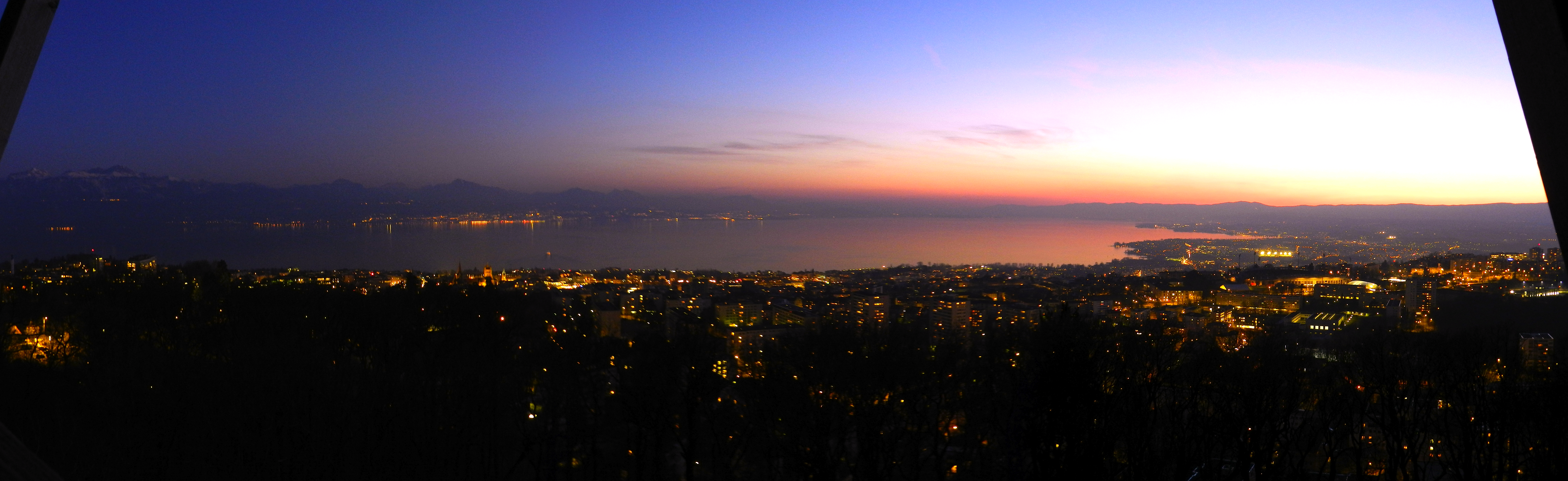 Couché de soleil sur le lac Léman. Vue depuis Lausanne, plus précisément la tour du parc de Sauvablin.